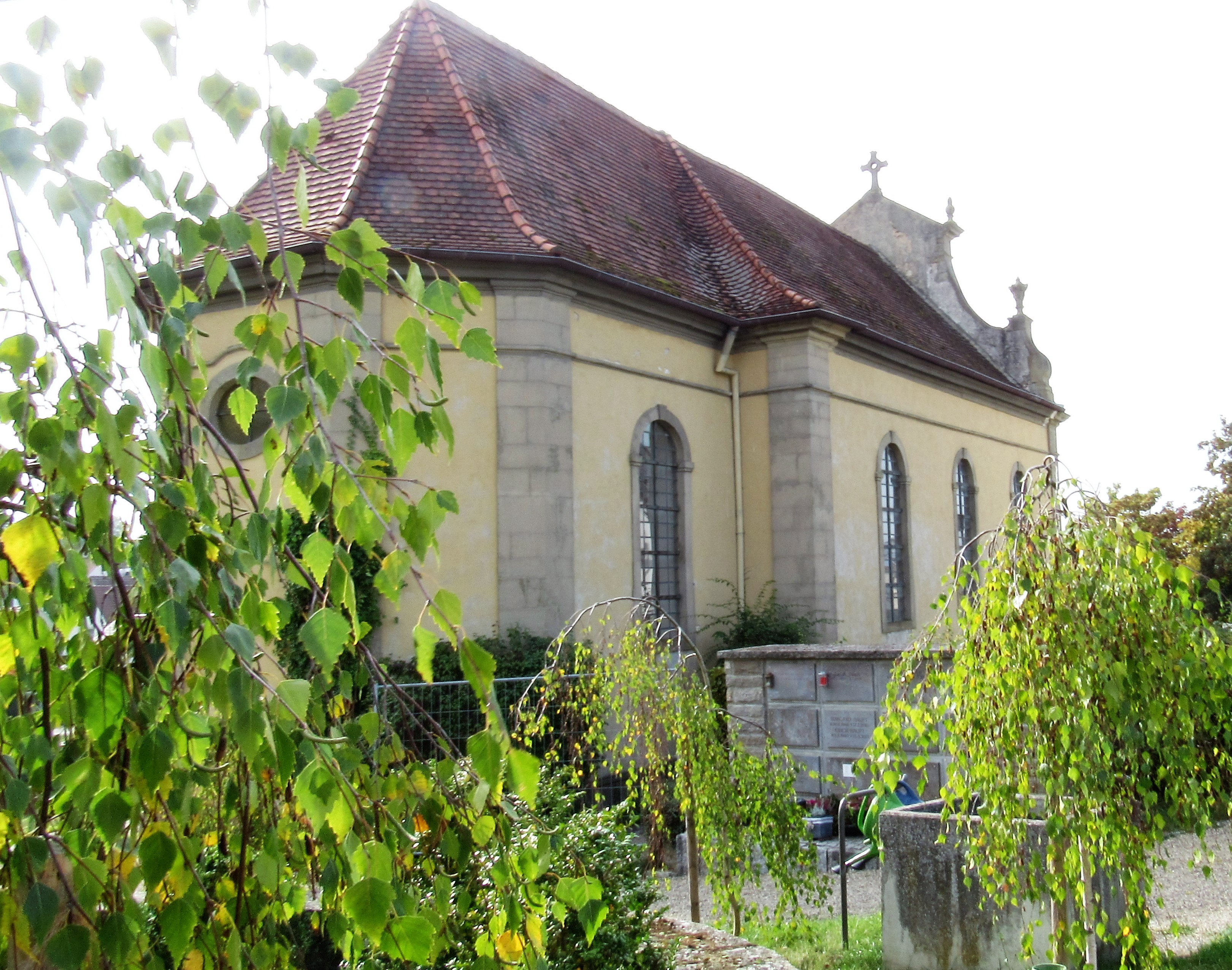 Alte Kirche Pfändhausen